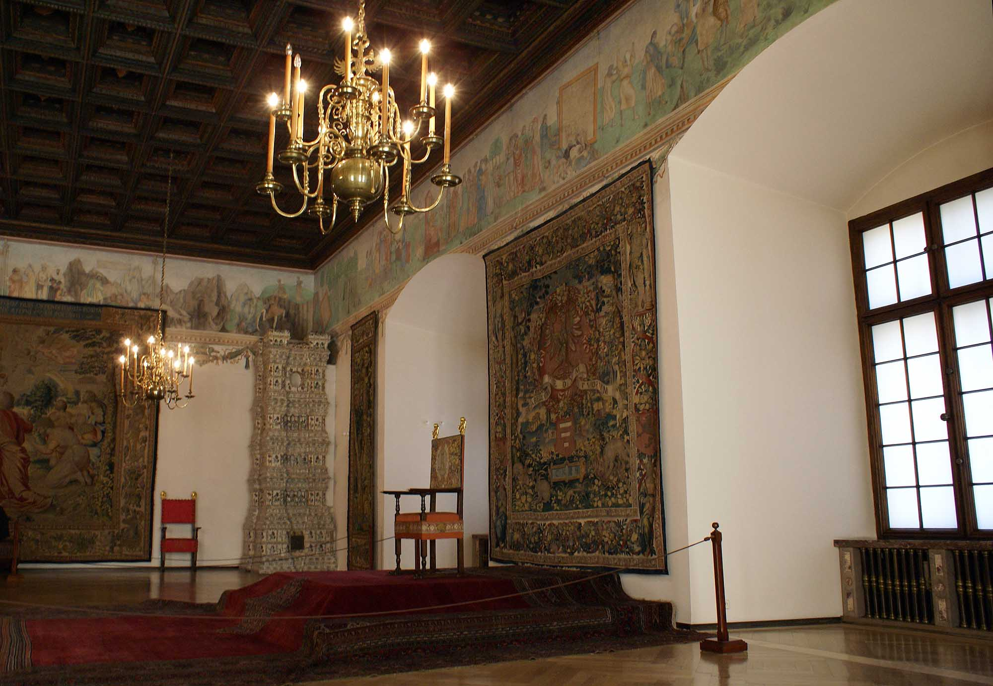 Kraków, zespół Wzgórza Wawelskiego